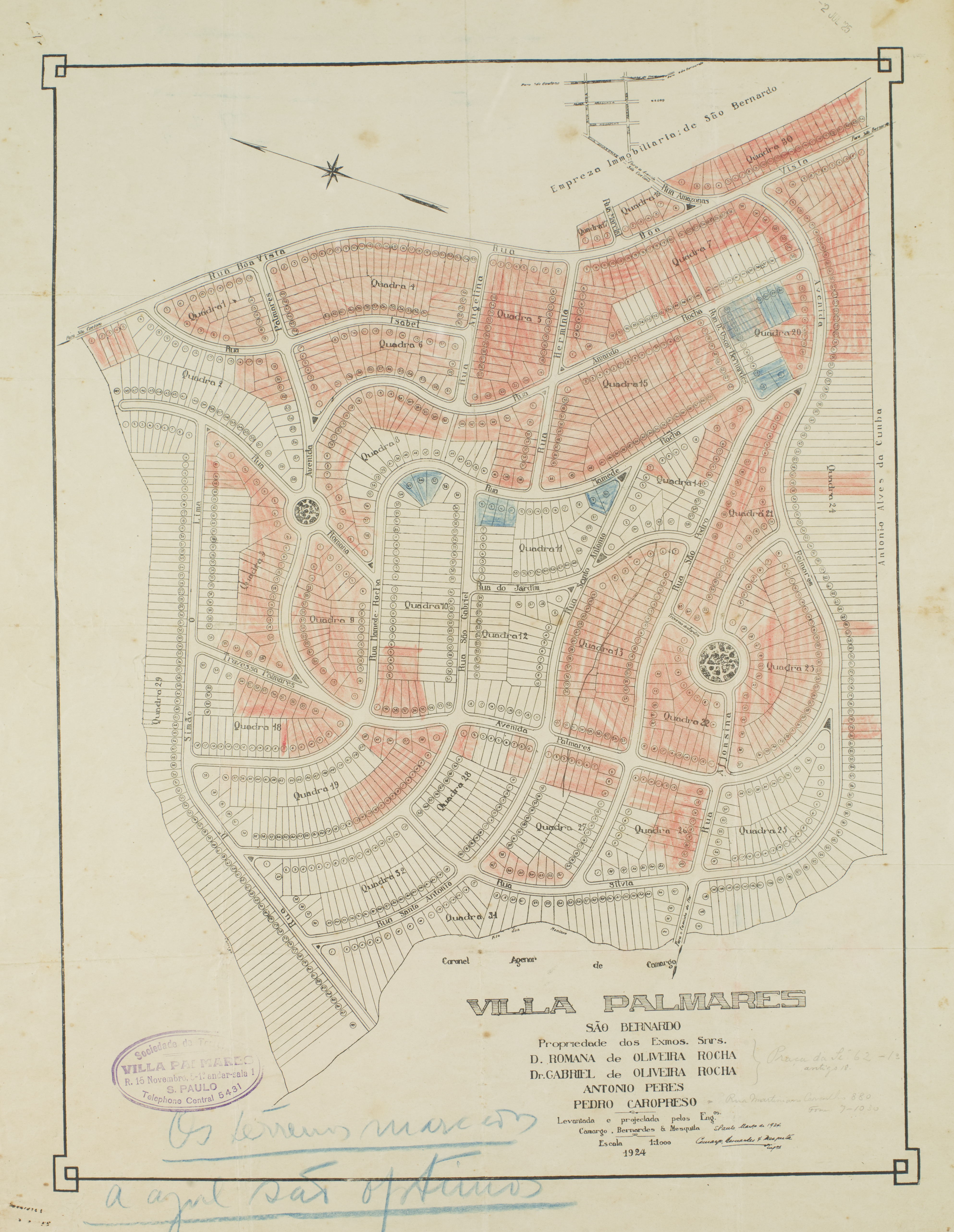 Obra que integra o acervo do Museu Paulista da USP. Coleção João Baptista de Campos Aguirra